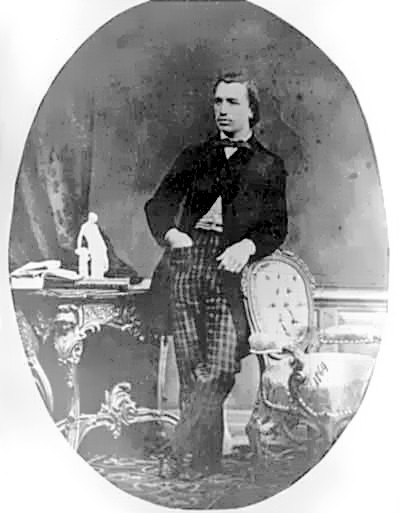 Mihai Eminescu în tinereţe. Young Mihai Eminescu